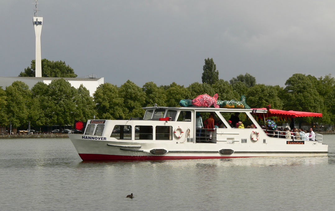 Maschseeboot